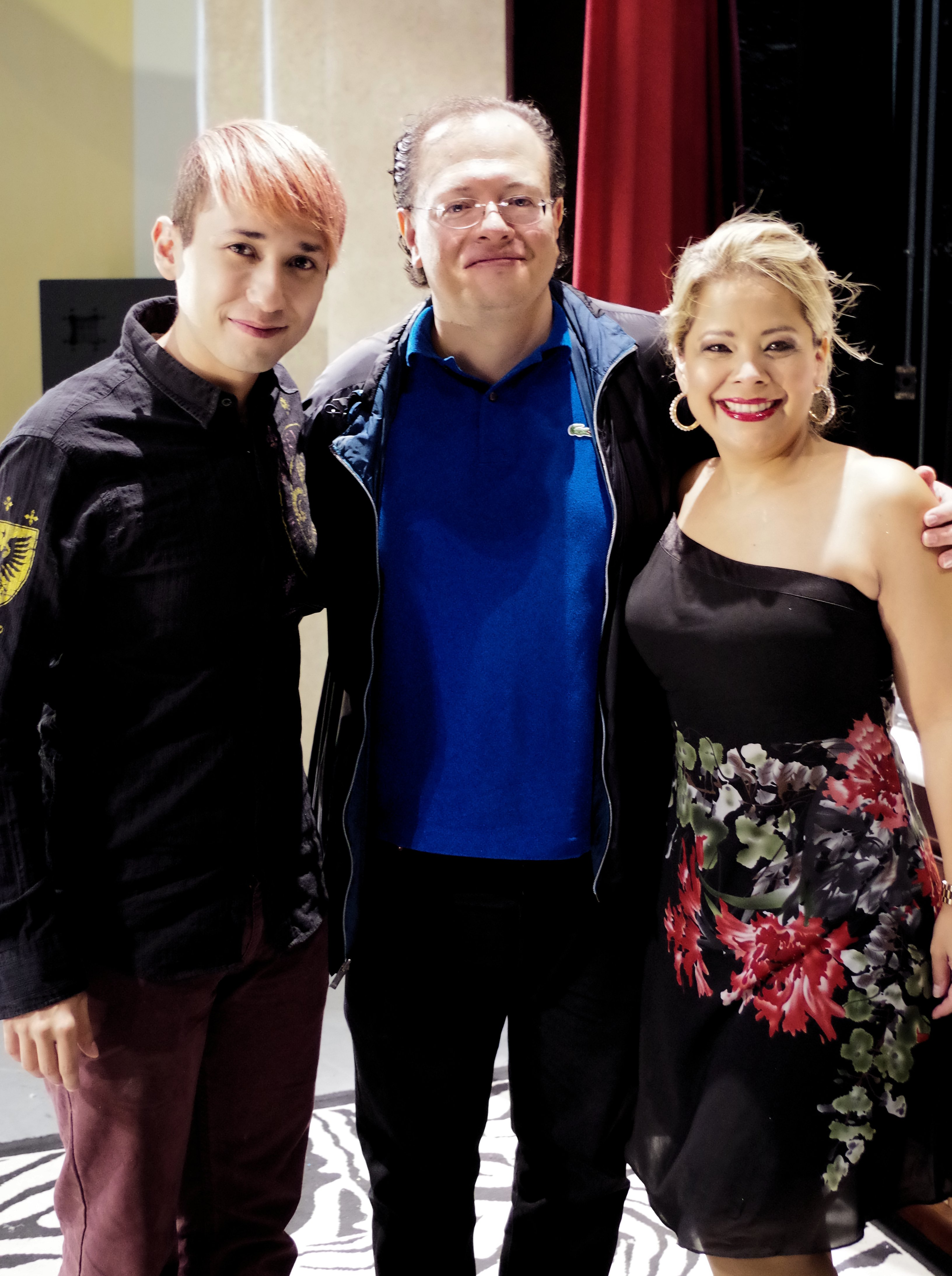 Mikky Lafey, Sergio Zurita y Eloina Lafuente en el Teatro José Vasconcelos, durante la presentación del programa de MVS Radio: Dispara Margot Dispara en Piedras Negras; Coahuila. México. Televisado por SuperChannel22.